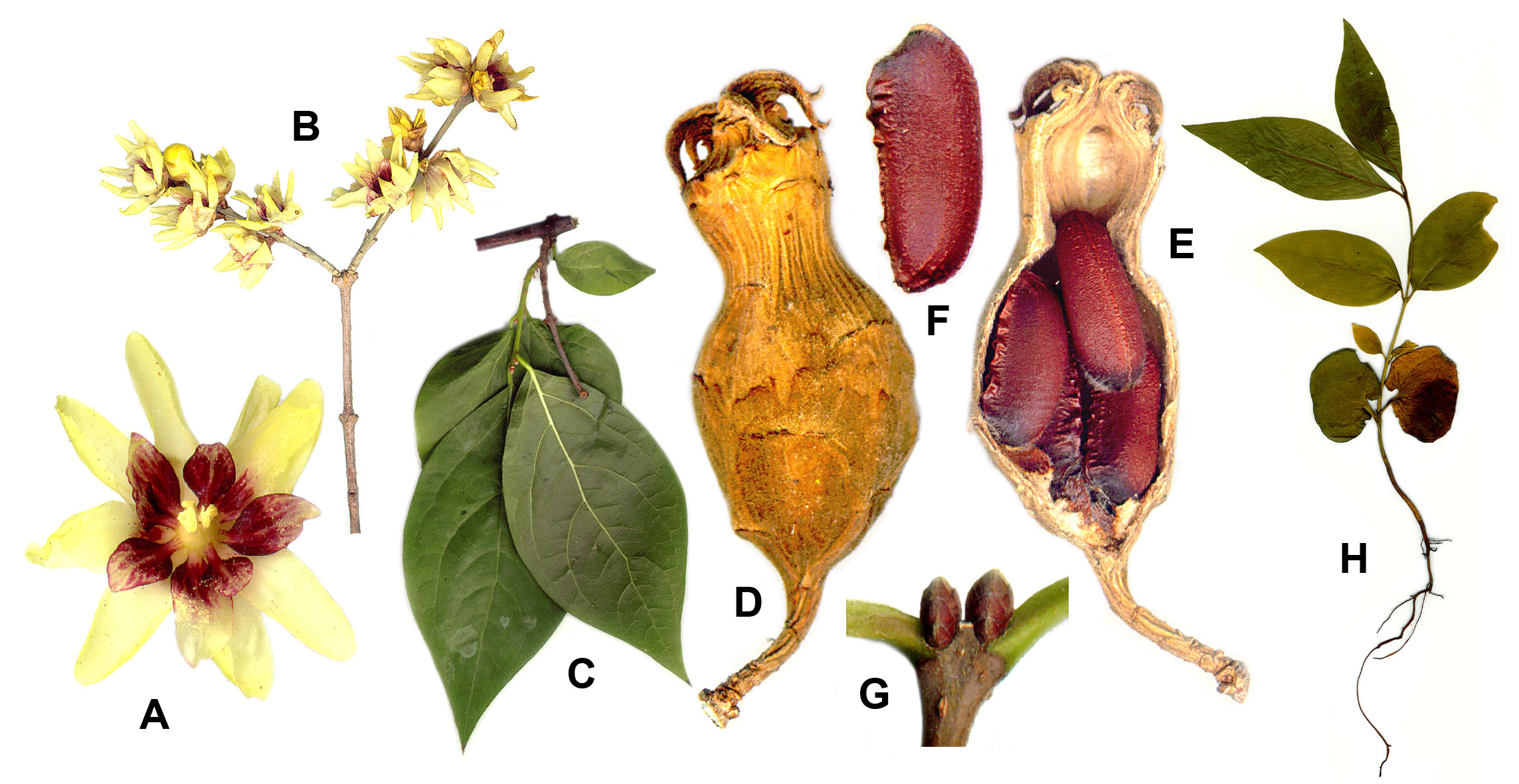 Chimonanthus praecox (author: Mihailo Grbić)